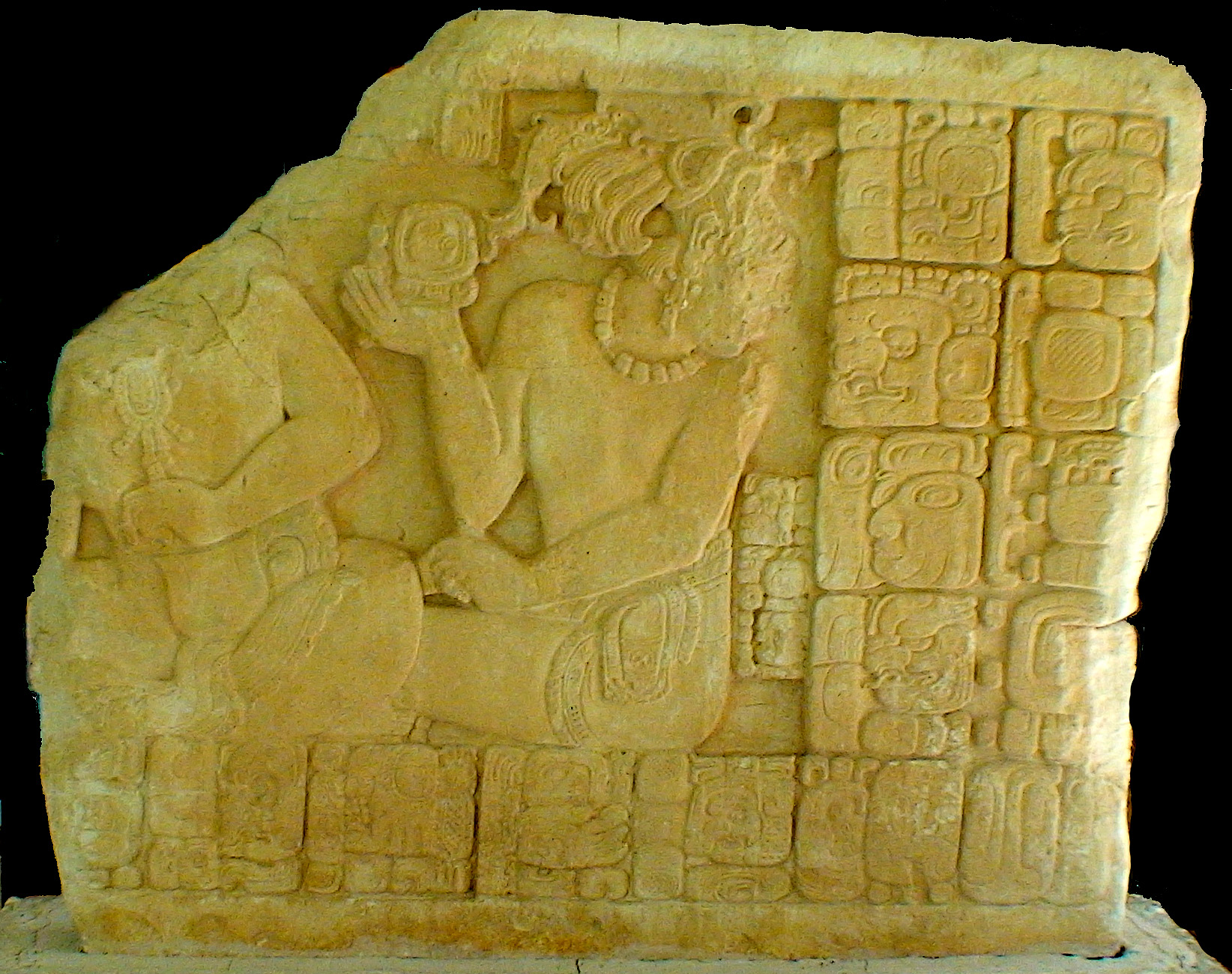 Pomona, Tabasco, Mexico: Tablero 1